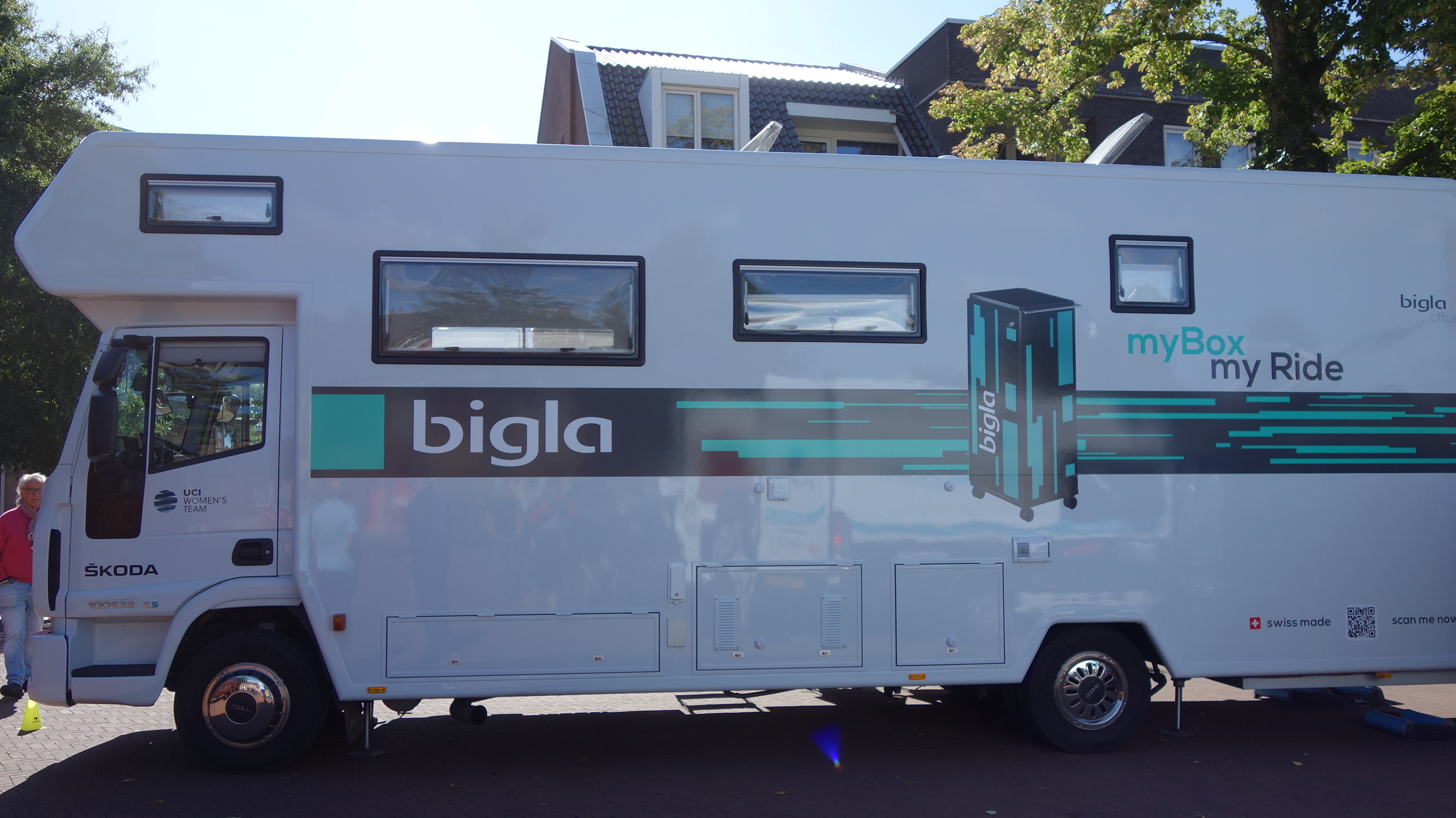 Bus van Bigla bij de start van de eerste etappe van Stramproy naar Weert in de Boels Ladies Tour 2019